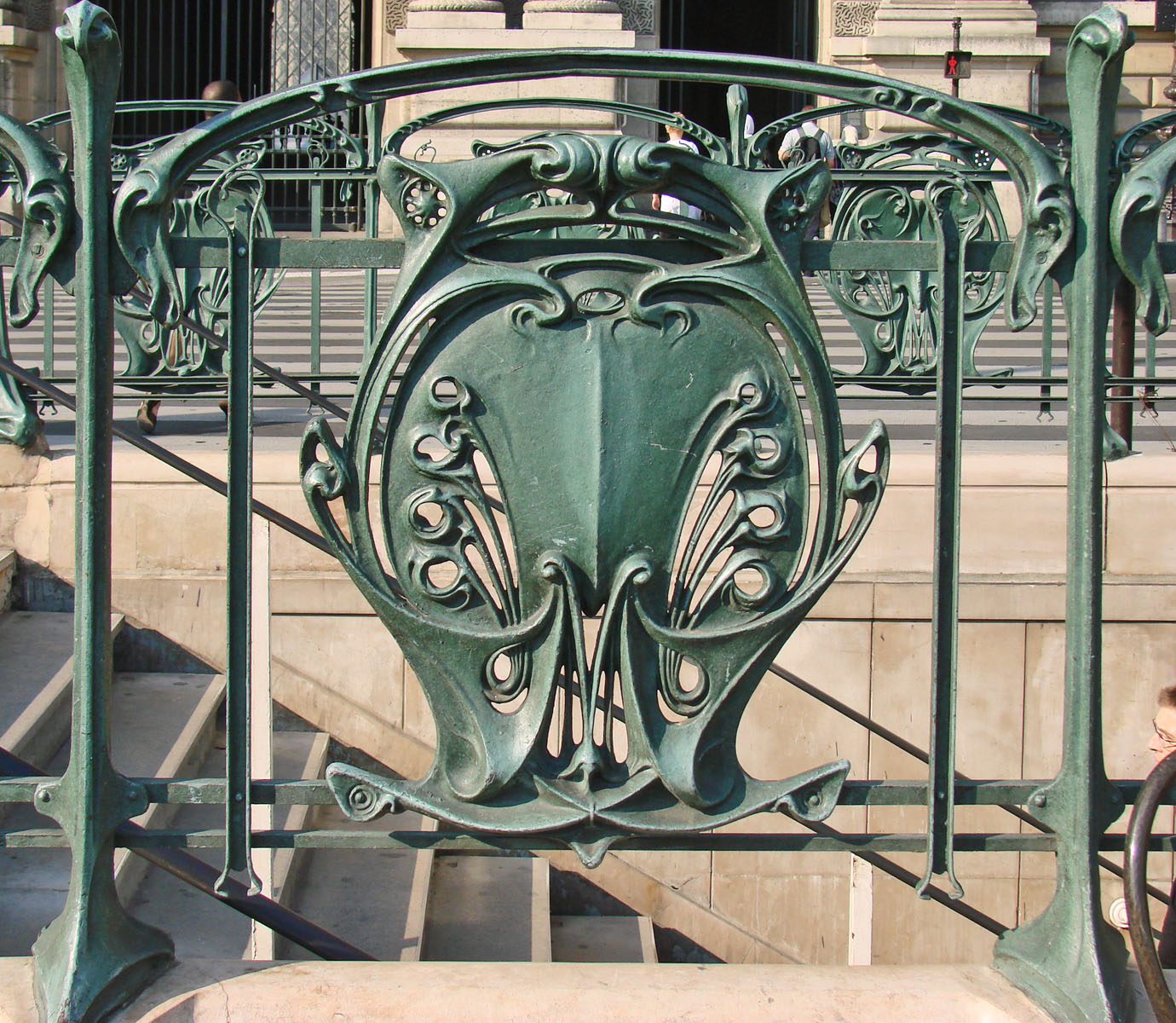 Lors de la construction en 1898 du réseau métropolitain , un concours est lancé pour la décoration des entrées de stations de métro. Hector Guimard (1867-1942) participe à ce concours et va construire de nombreux édicules pour les stations existantes (lignes 1 à 6). Sur la photographie, on voit des détails de la station Palais-Royal sur la ligne 1. Ils seront terminées en Février 1900 soit 6 mois avant l'ouverture du métro (Juillet 1900).